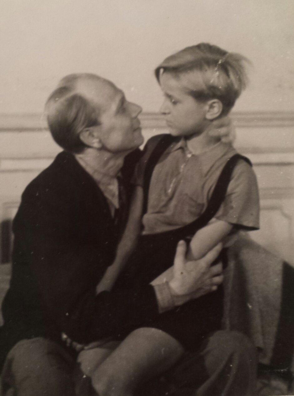 Erich Gühne und Edmund Moeschke